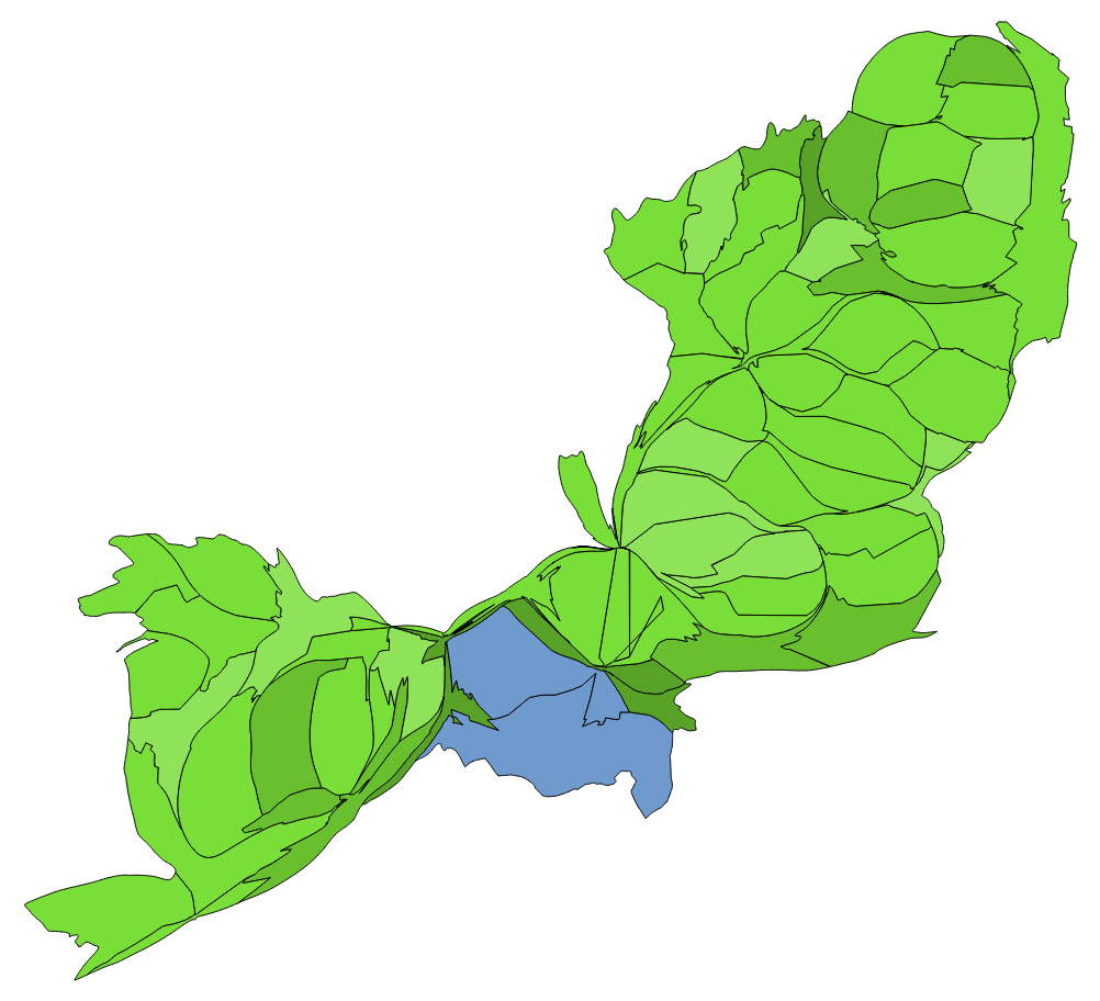 顏色對照表